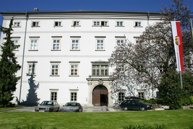 Nordico museum in Linz, Upper Austria